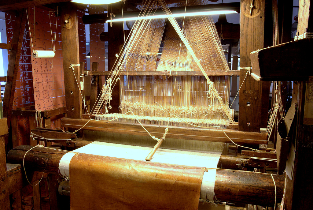 Jacquardweefgetouw, Herm. Schroers (Krefeld), ca 1850-1900 (01693) Jacquardweefgetouw, Herm. Schroers Krefeld, ca 1850-1900 (01693)2